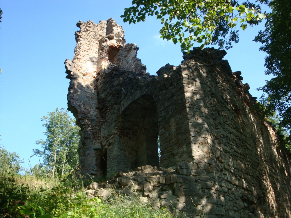 Konvendihoone varemed.